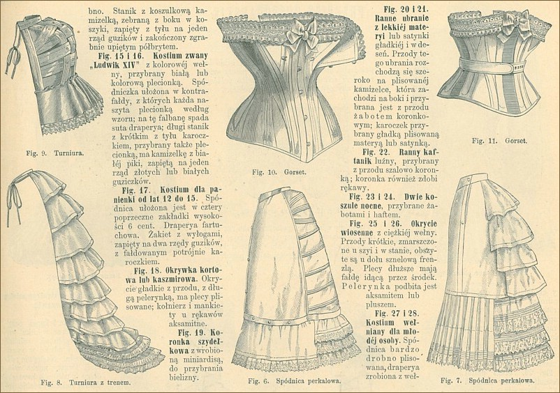 Strona czasopisma "Świt" z 1884 roku, dodatek do nr 8, ryc. nr 6-11, s. 133; turniury, gorsety i halki